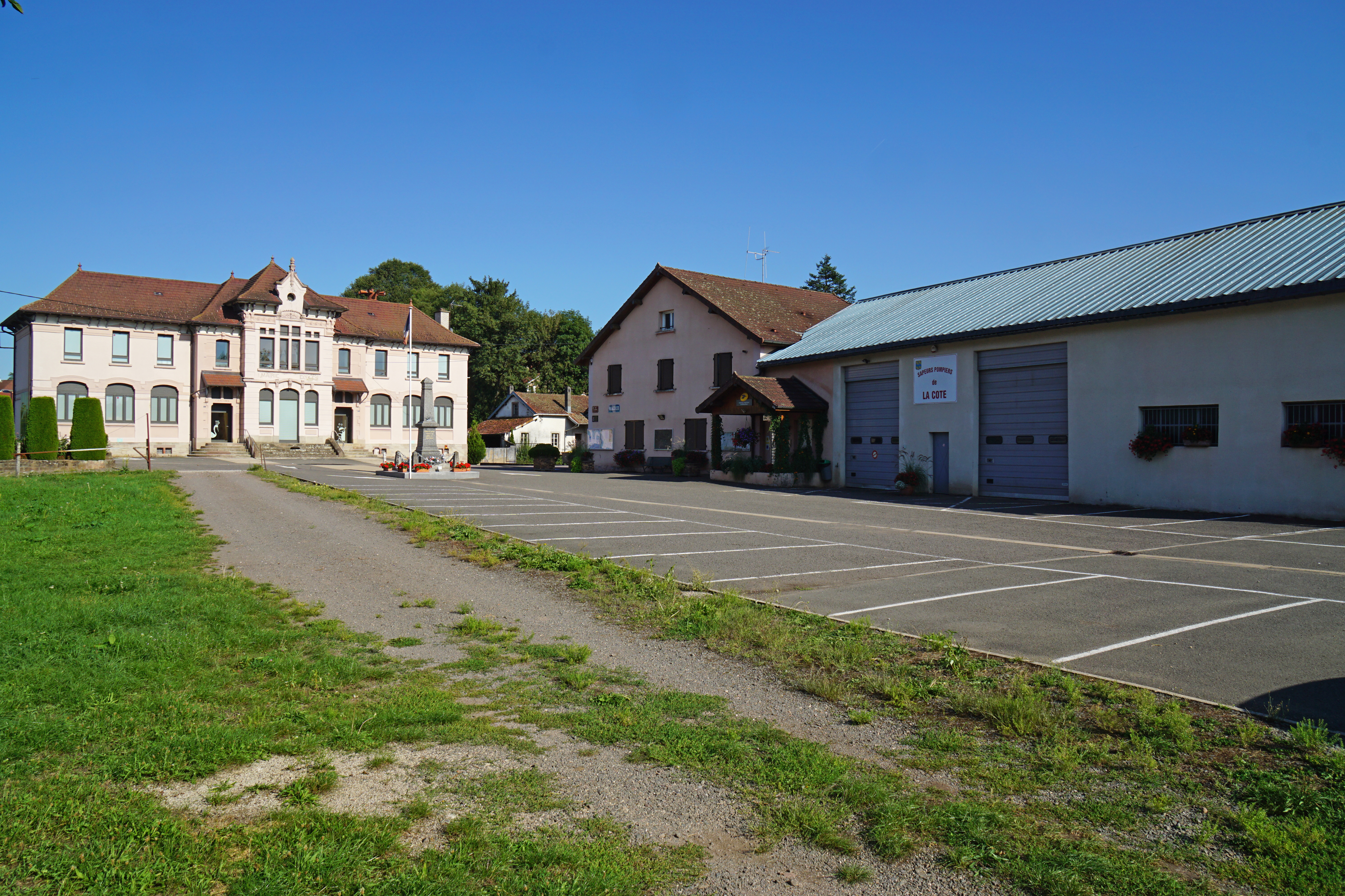 L'école, la mairie, la poste et la caserne des pompiers de La Côte (Haute-Saône).